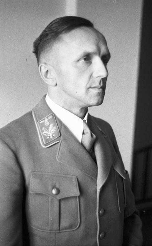 Gerhard Klopfer Ernennung Gerhard Klopfers zum Staatssekretär in der Parteizentrale des Führers. [Porträt von Gerhard Klopfer]